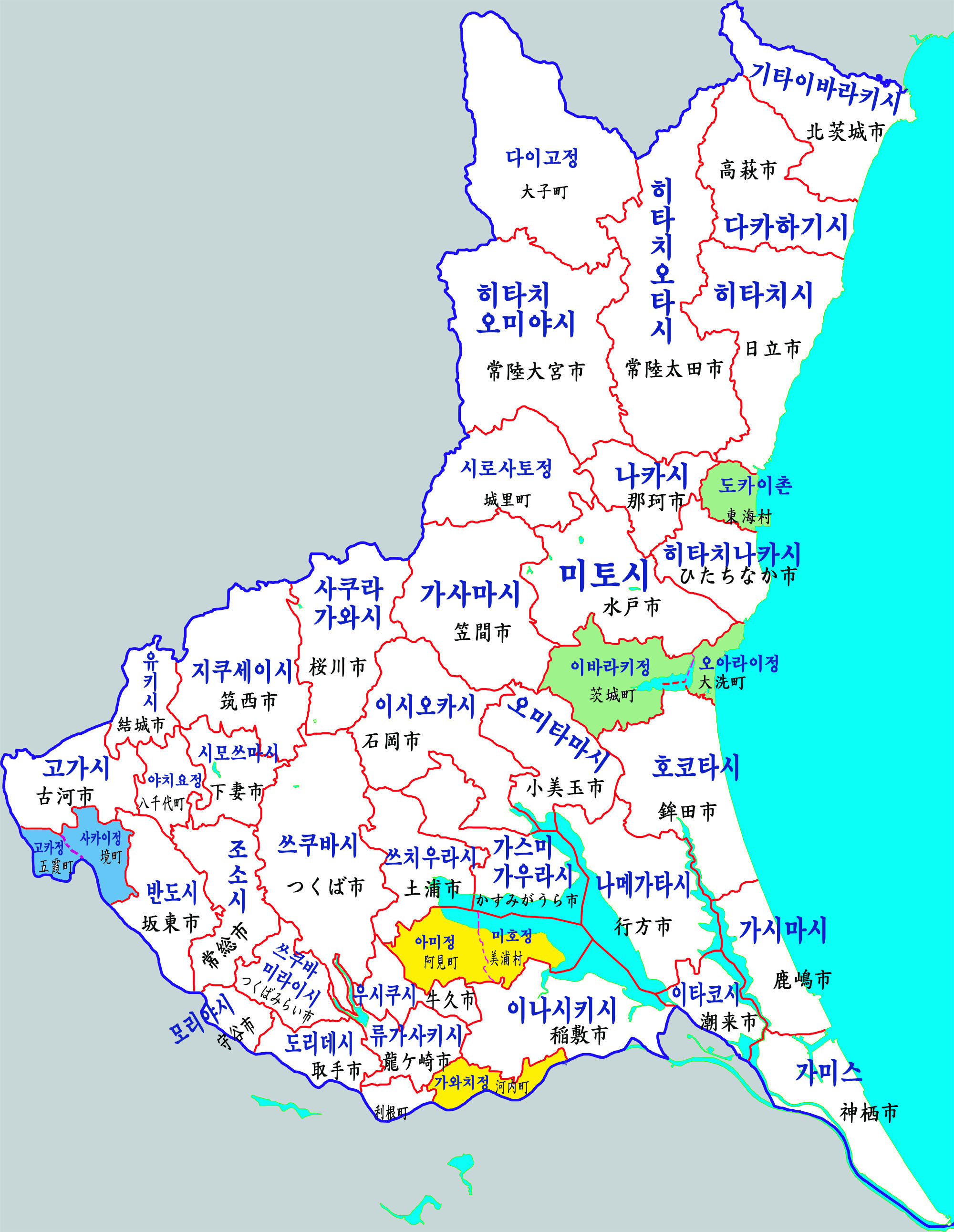 이바라키현 행정구역